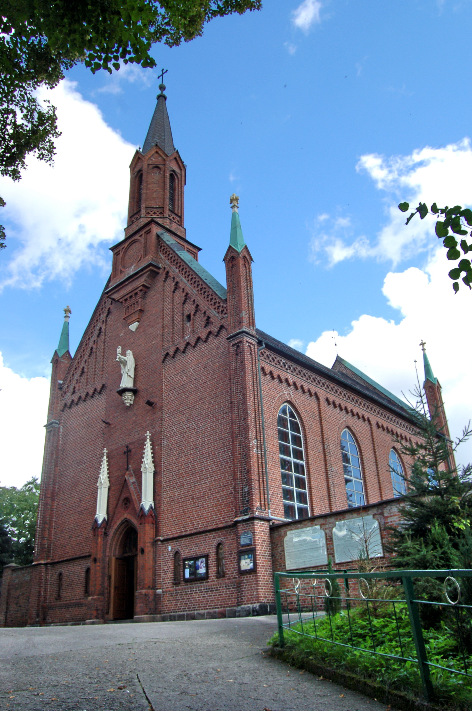 Słupsk, ul. Henryka Pobożnego 7 - kościół klasztorny pw. św. Ottona, 1872-1873.